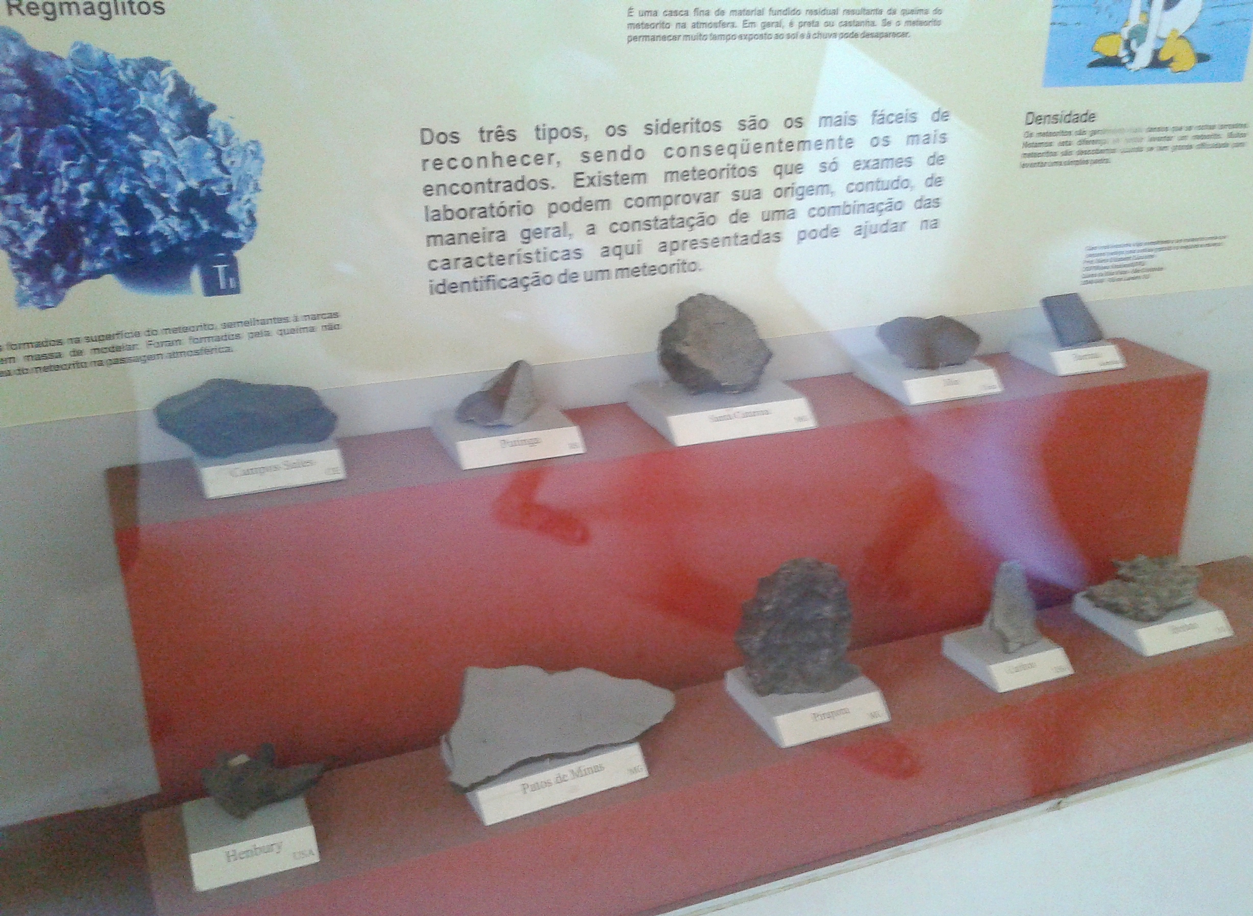 Português do Brasil: Coleção de meteoritos do Museu Nacional/UFRJ, Rio de Janeiro, Brasil.